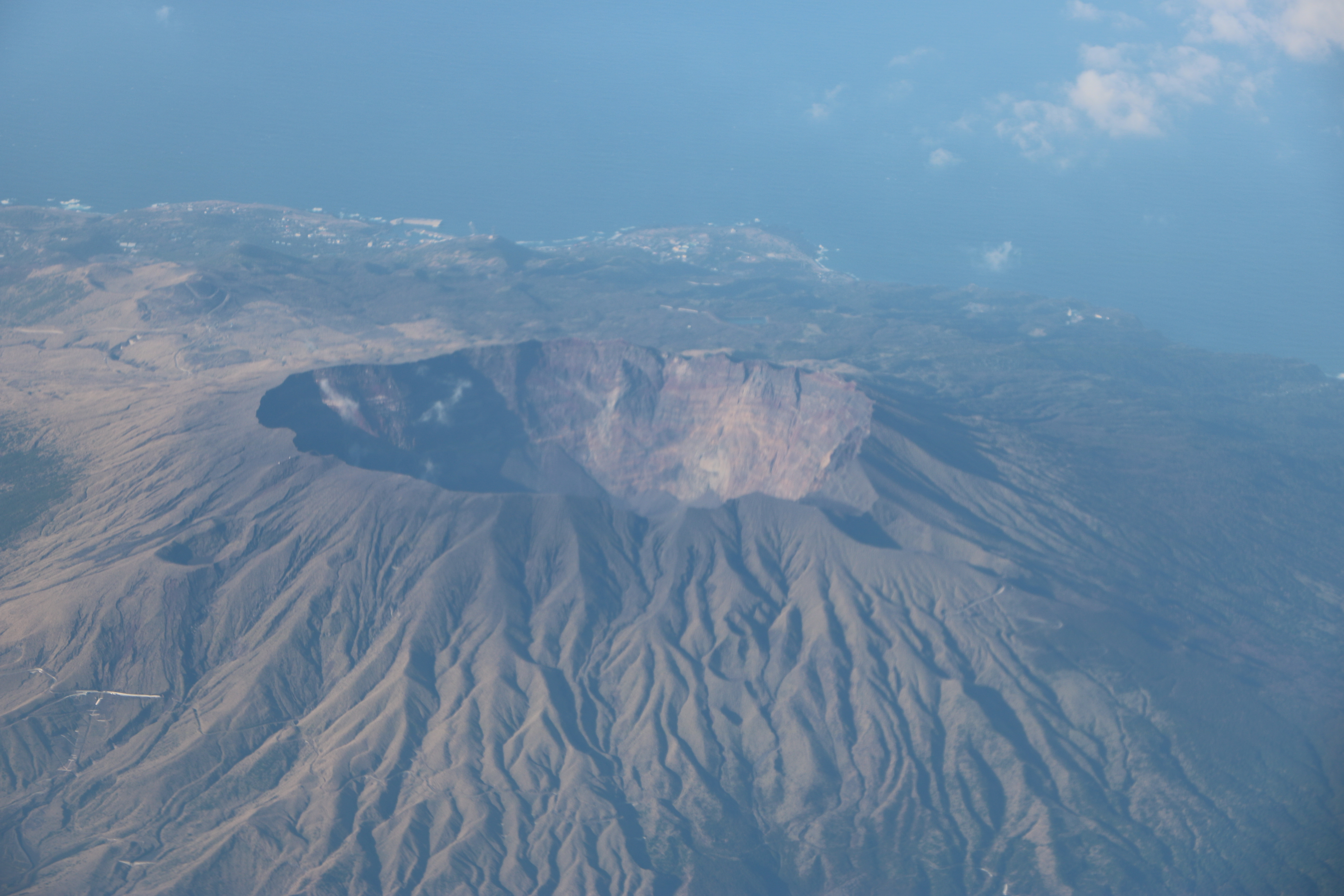 三宅島の雄山火口（定期航空機より撮影）